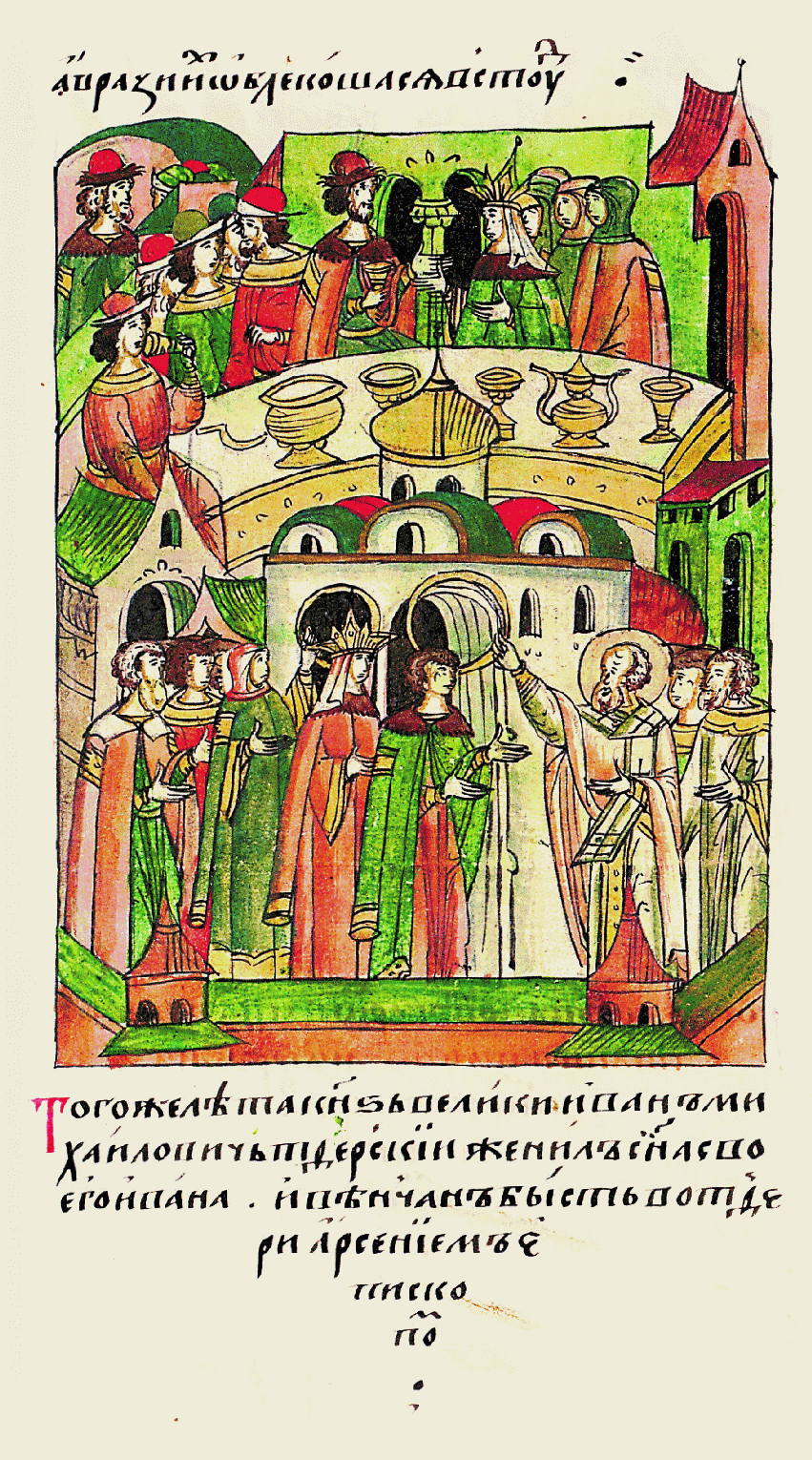 В том же году великий князь Иван Михайло- вич Тверской женил своего сына Ивана, а венчал его в Твери епископ Арсений.